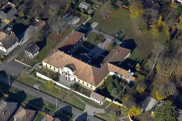 Galgagyörk, Tahy-kastély - légi felvétel